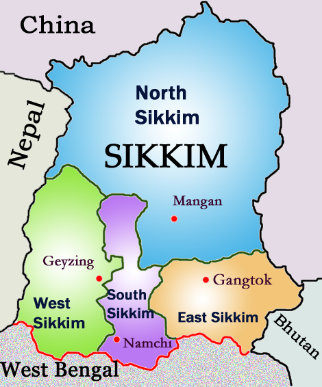 distritos del estado de sikkim